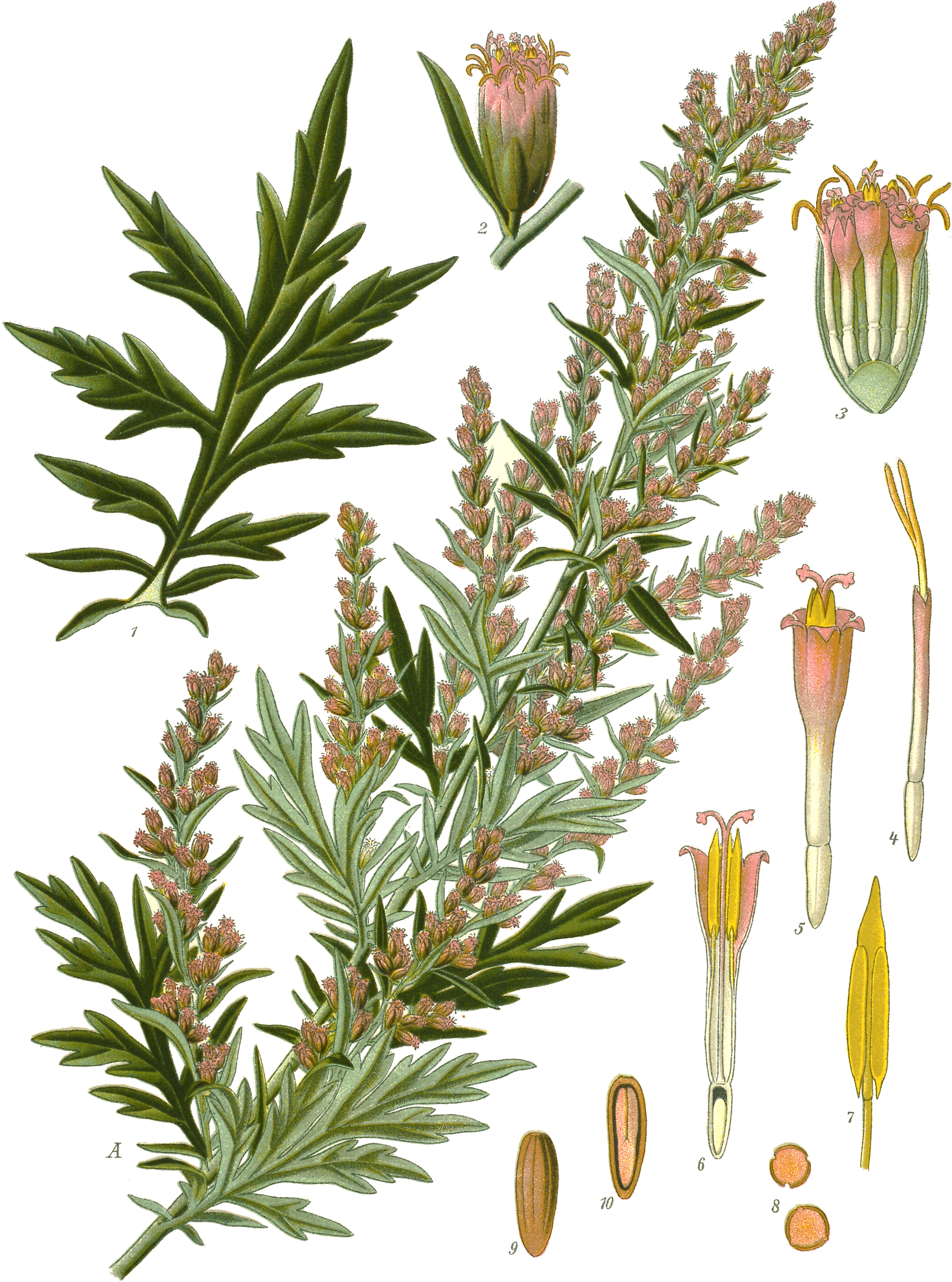 Beifuß, Artemisia vulgaris L.: A Blühender Zweig. 1 Stengelblatt. 2 Blütenkörbchen. 3 Längsschnitt desselben. 4 Randblüte. 5 Scheibenblüte. 6 Dieselbe im Längsschnitt. 7 Staubblatt. 8 Pollen. 9 Achäne. 10 dieselbe im Längsschnitt.